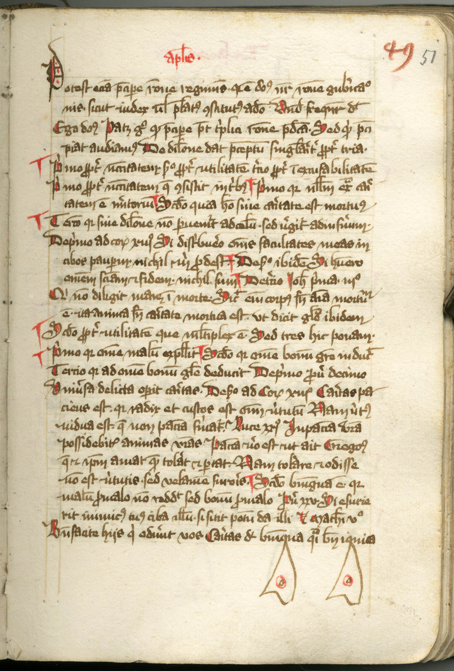 Universitätsbibliothek Graz, Ms. 1258, fol. 51r: Lateinische Handschrift des Andreas Kurzmann, identifizierbar an seinen Schriftzügen mit seinem Markenzeichen, den ausladenden g-Schleifen in der letzten Zeile